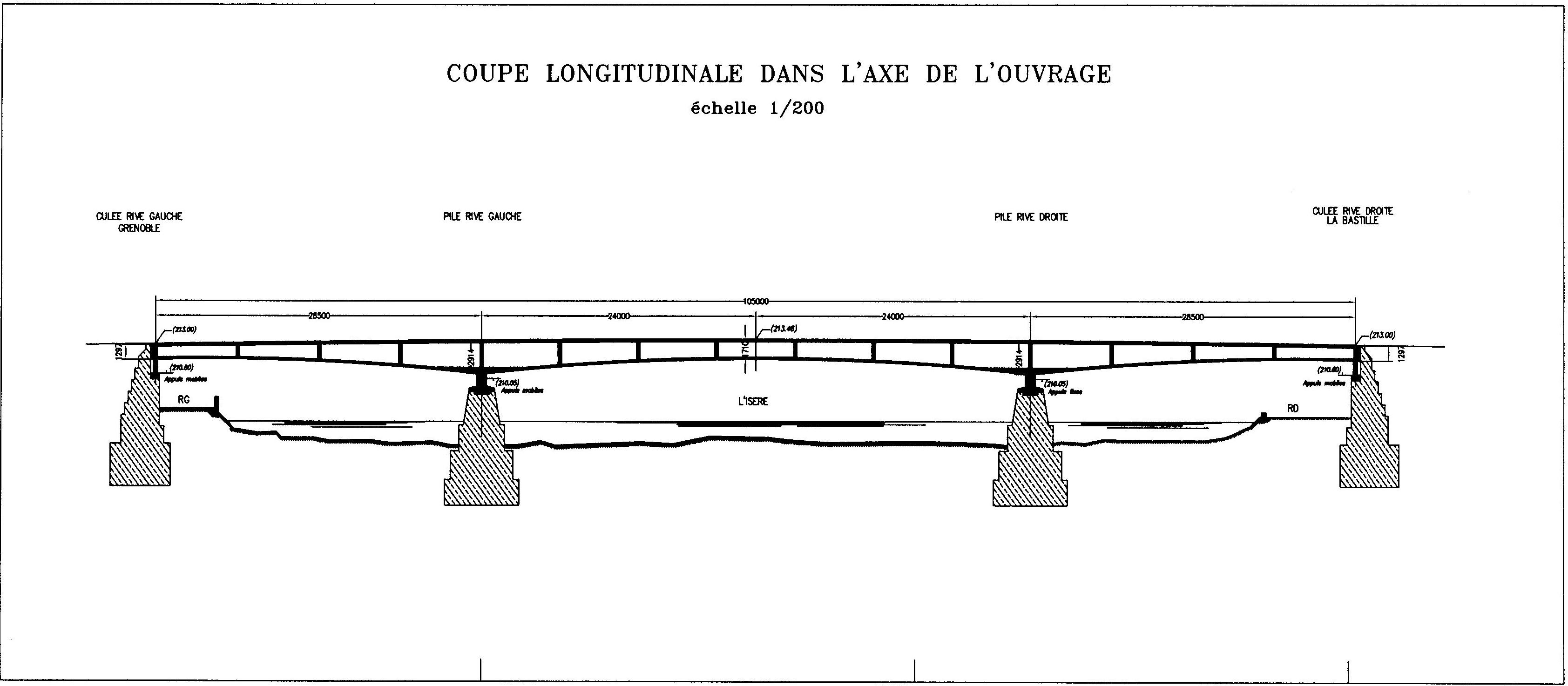 Coupe longitudinale du Pont de la Porte de France